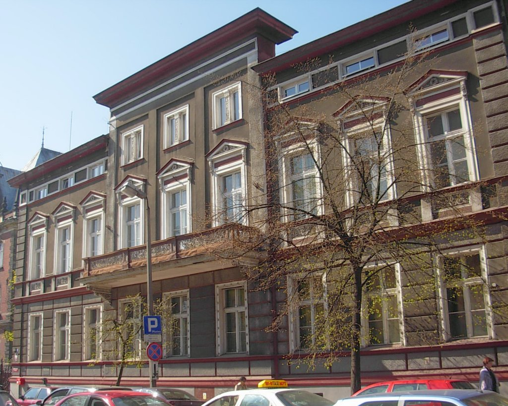 Archiwum Państwowe ul. Dworcowa 65 w Bydgoszczy